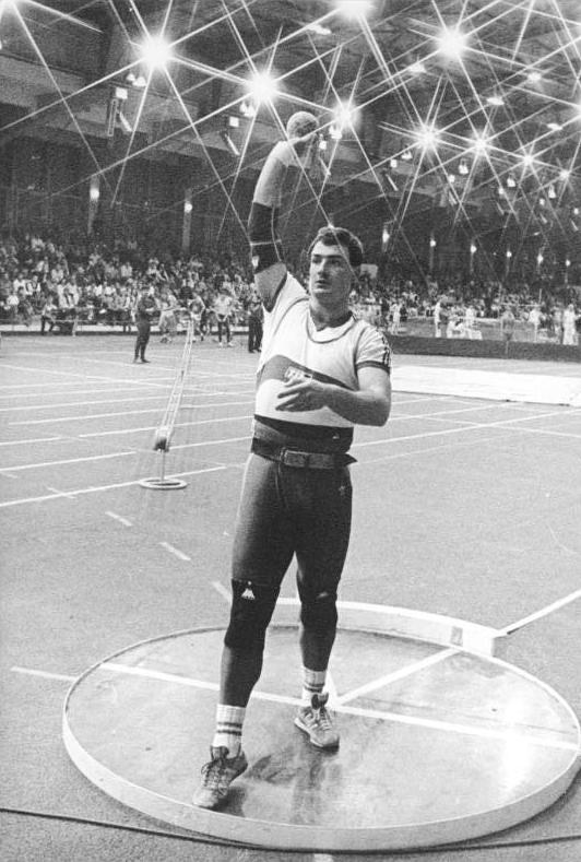 Ulf Timmermann ADN-ZB Weisflog 11.2.89 Senftenberg: DDR-Hallenmeister schaften der Leichtathleten- Der 26jährige Berliner Kugelstoß-Olympiasieger Ulf Timmermann (TSC) erzielte in der Senftenberger Sporthalle "Aktivist" mit 22,55 m einen neuen Hallen-Europarekord. Er errang damit seine sechsten DDR-Hallen-Meistertitel.